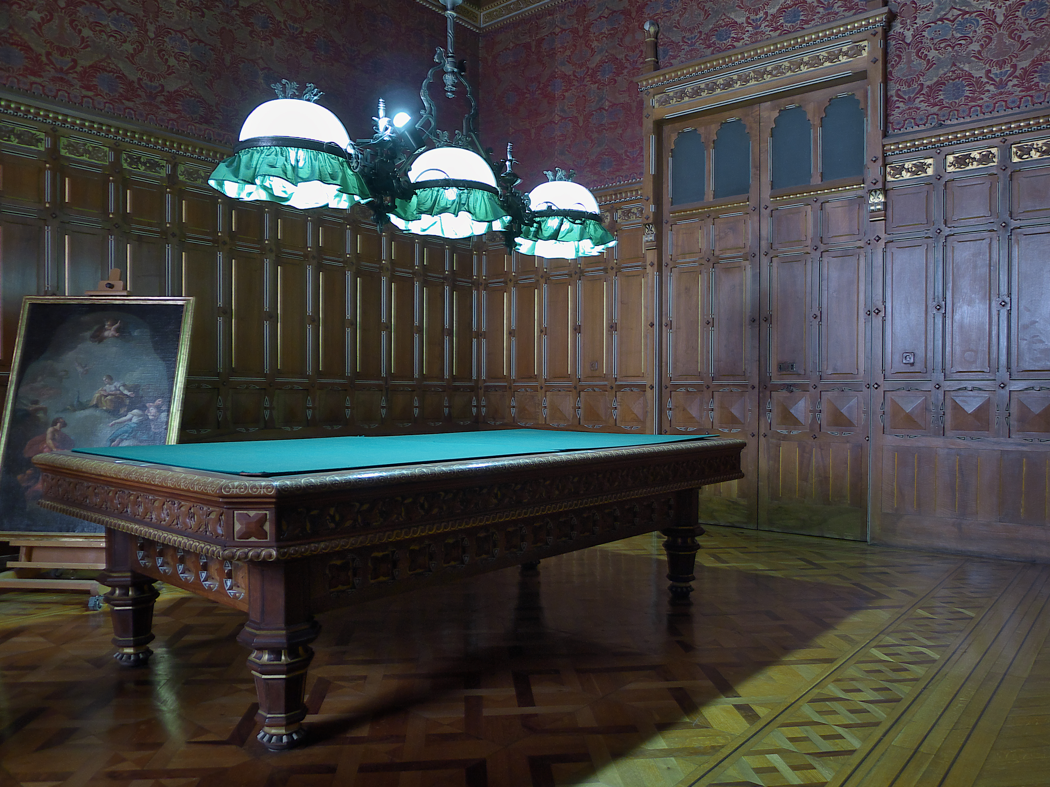 Antiguo Cuarto de la Reina María Luisa de Parma. Alfonso XII encargó a José Segundo de Lema (1879-1881) la decoración de esta sala con estilo victoriano inglés. La mesa de billar es de la Casa Blanchard.